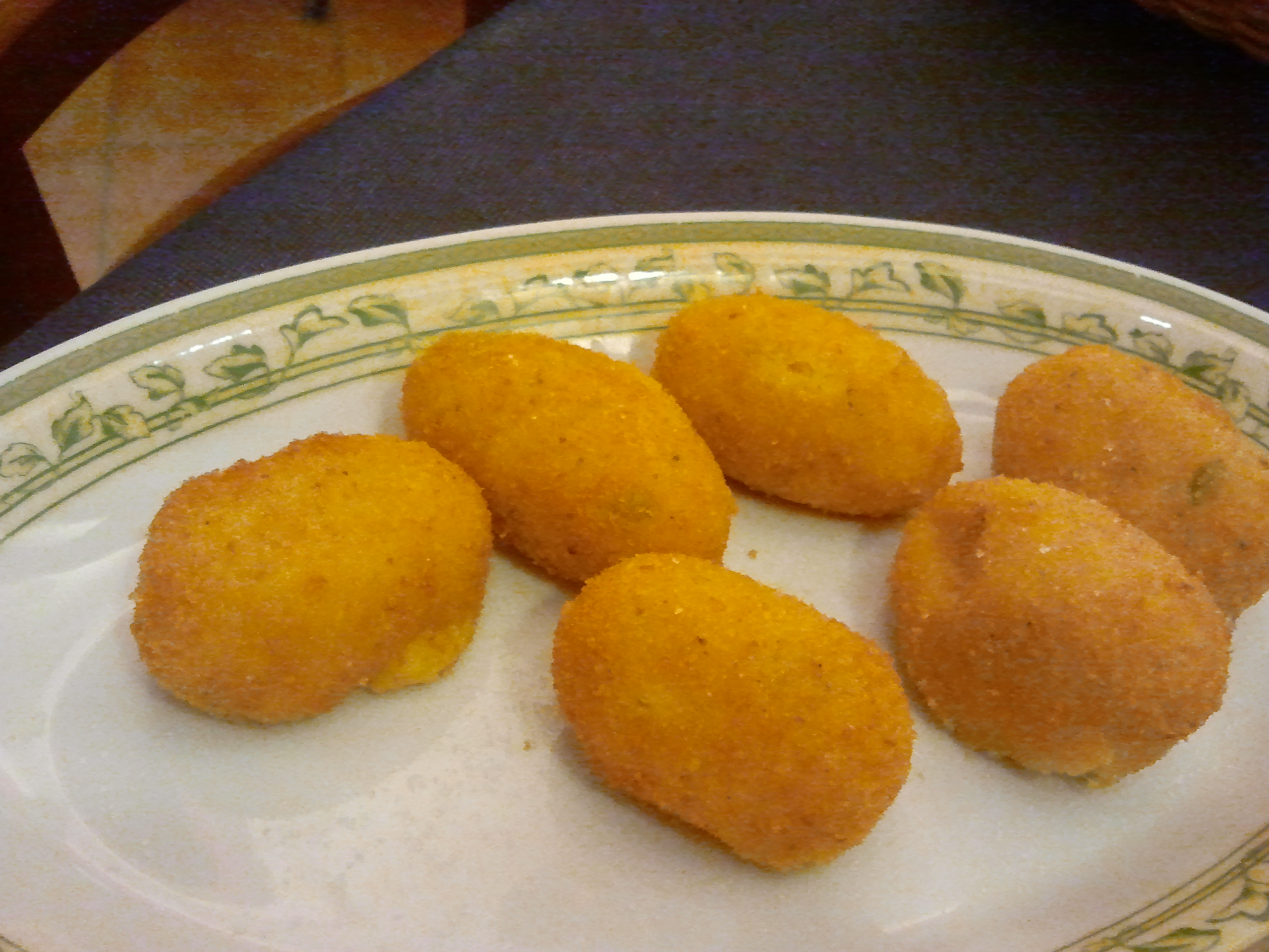 Crocchè